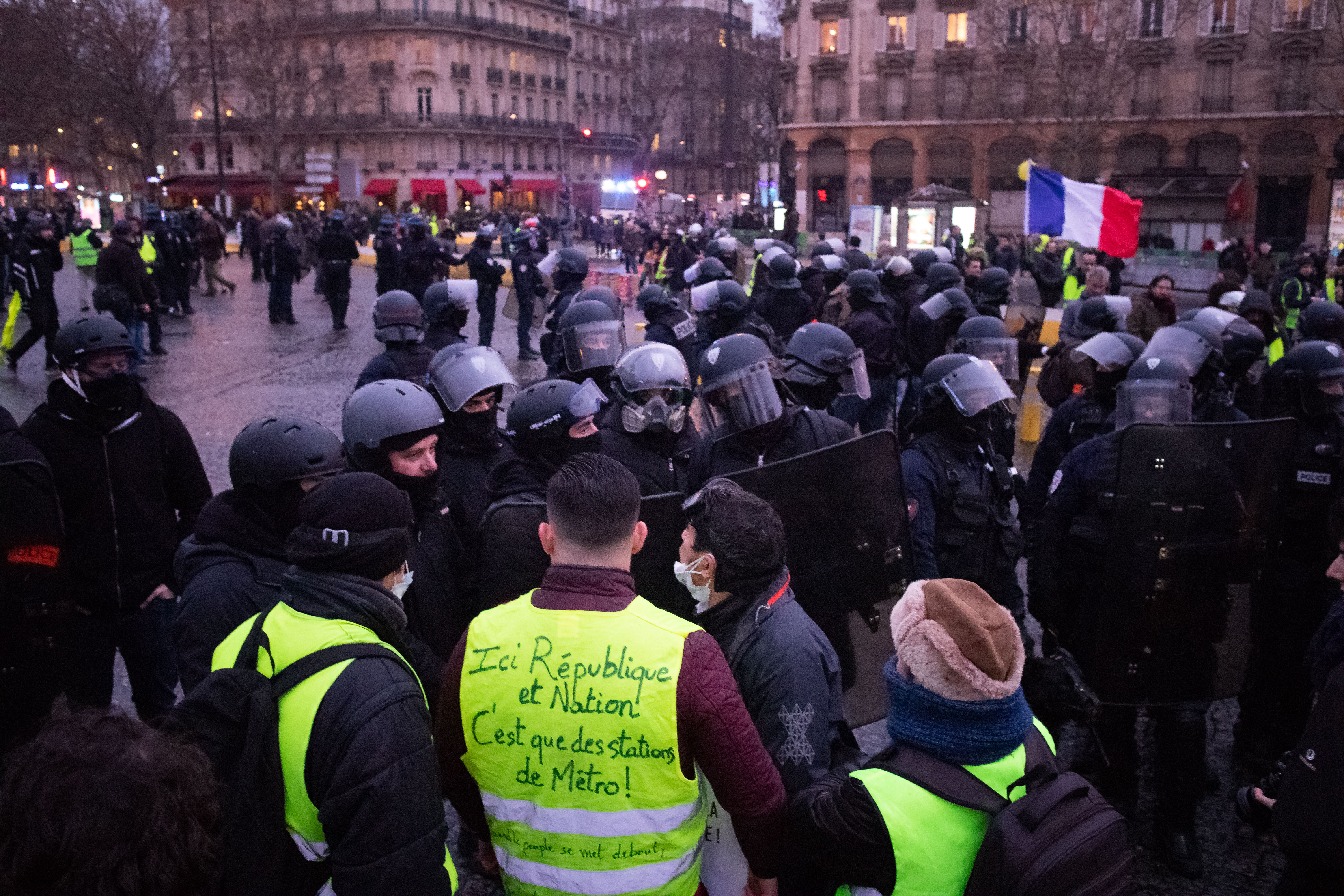 Paris, place de la Bastille, 26/01/2019